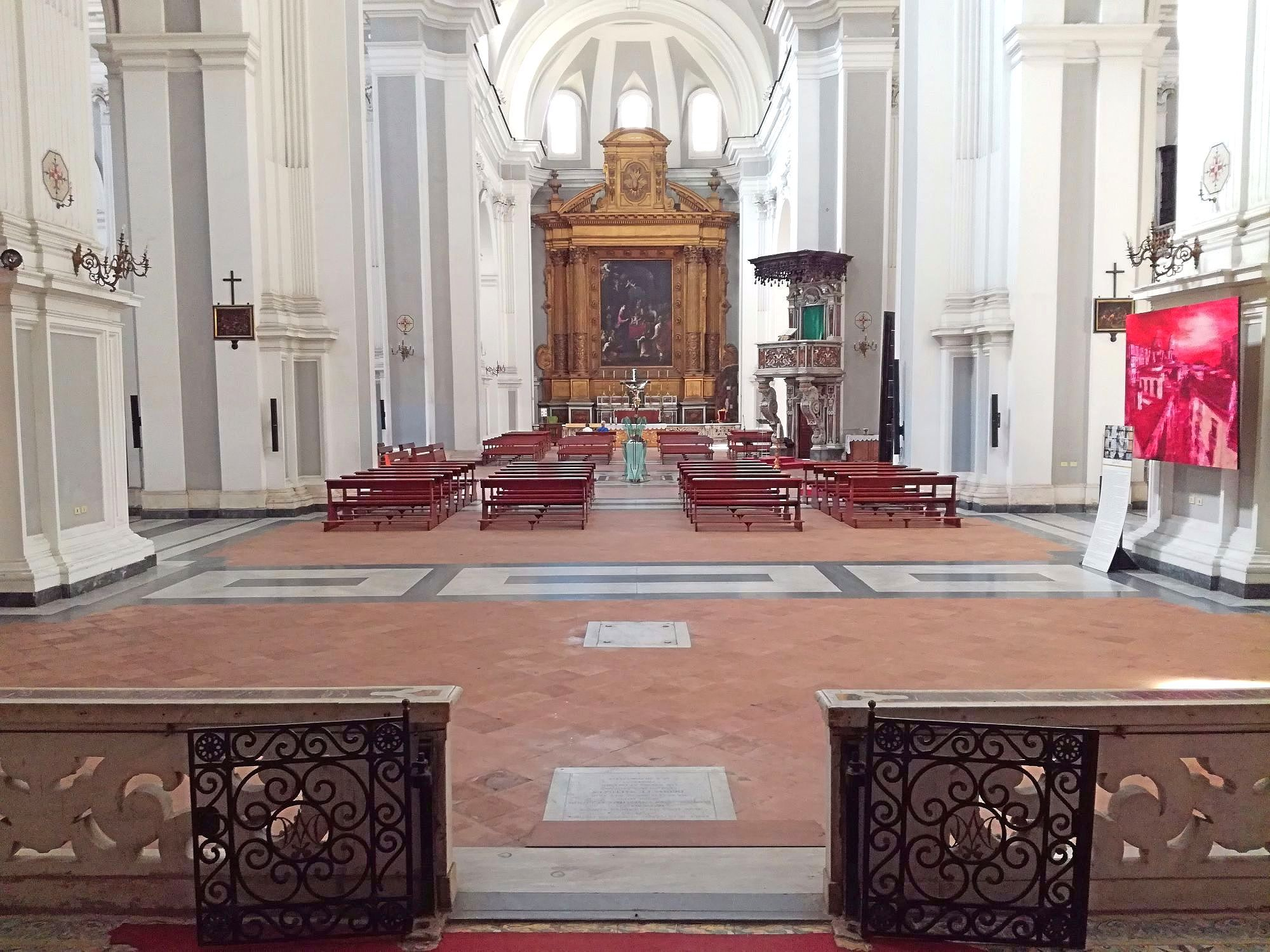 Transetto basilica di Santa Maria della Sanità